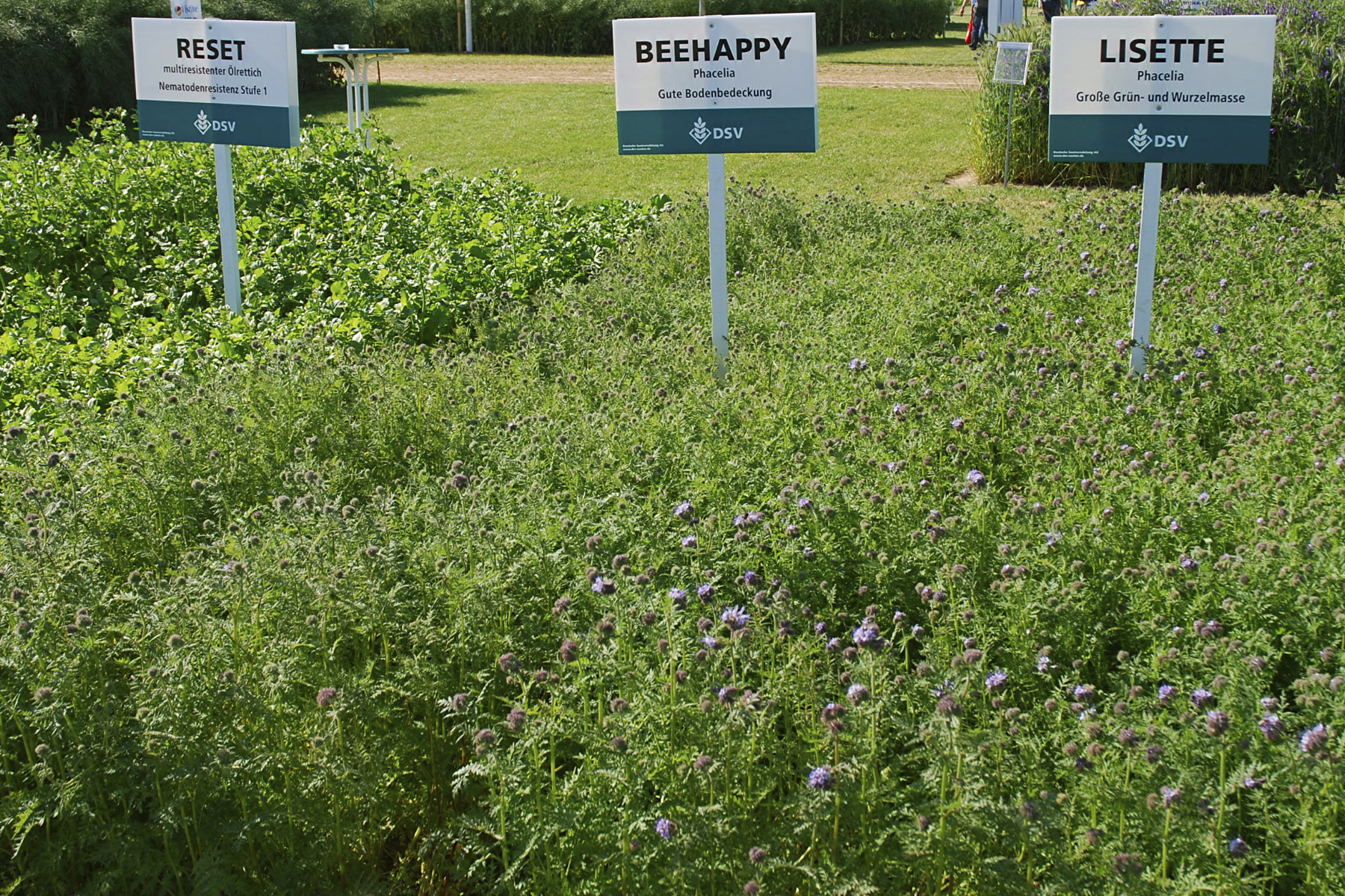 DSV-Vorstellung von Sommerzwischenfrucht-Sorten (Gründüngung): Ölrettich (Raphanus sativus var. oleiformis) „Reset“, zur biologischen Nematodenbekämpfung z.B. in Zuckerrübenfruchtfolgen geeignet, Rainfarn-Phazelie (Phacelia tanacetifolia) „Beehappy“, als spät blühende Bienenweide mit schneller Bodenbedeckung zur Mulchsaat geeignet, Rainfarn-Phazelie „Lisette“, zur Mulchsaat und dank großer Wurzelmasse besonders zum aktiven Erosionsschutz geeignet; DLG-Feldtage 2010, Gut Bockerode, Springe-Mittelrode, Niedersachsen, Deutschland.